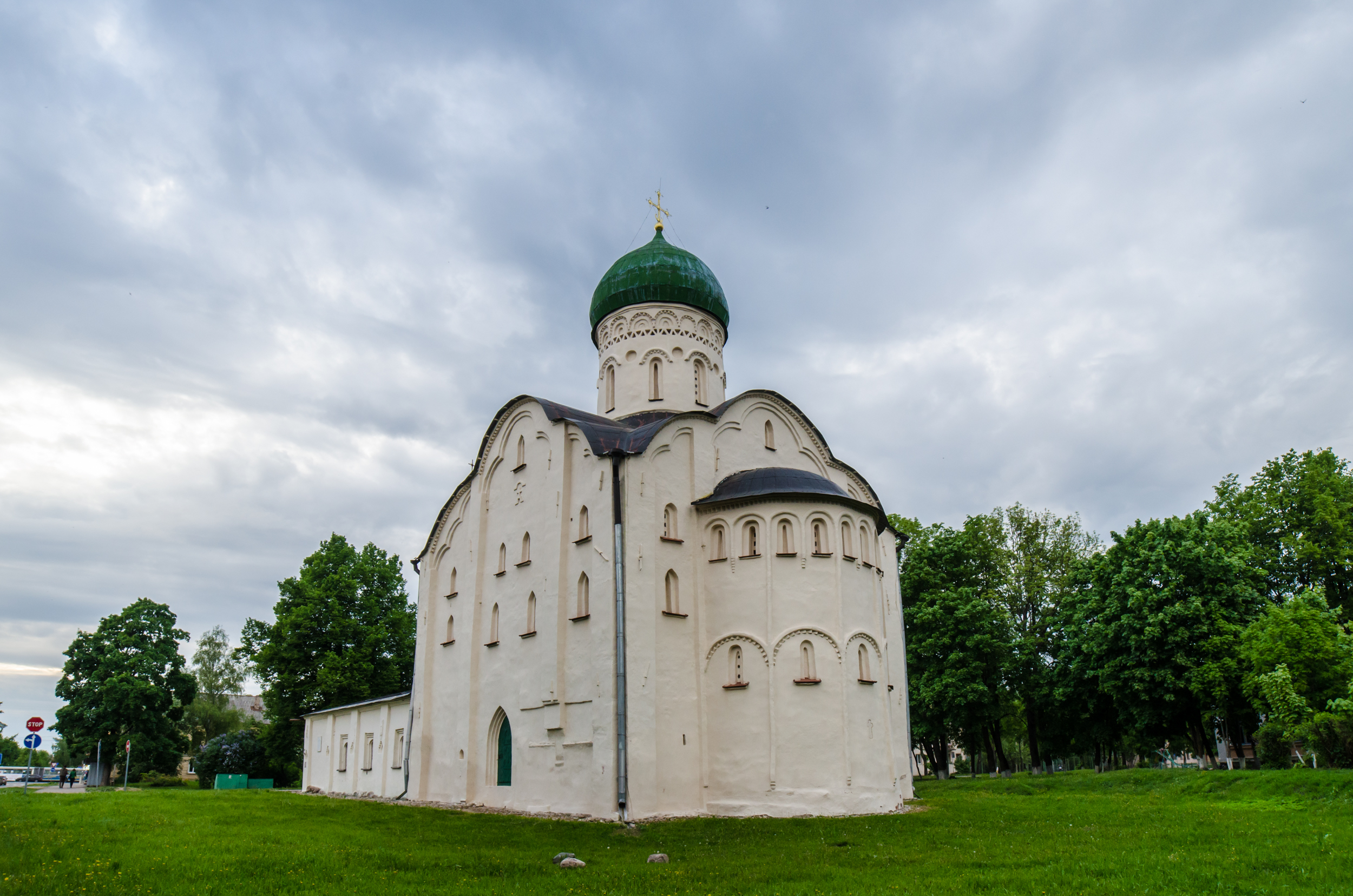 Церковь Федора Стратилата на Ручье: улица Федоровский Ручей, 19, Великий Новгород, Новгородская область